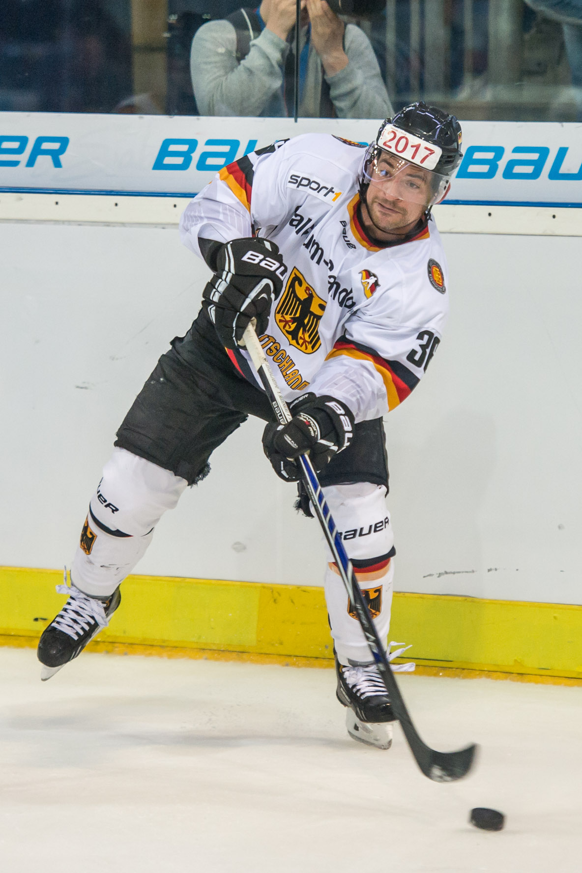 Yannic Seidenberg im WM-Vorbereitungsspiel gegen die USA in Nürnberg